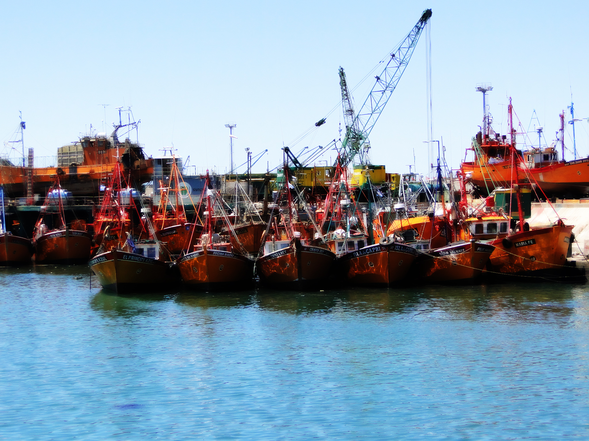 Puerto de la Ciudad de Mar Del Plata Buenos Aires Argentina